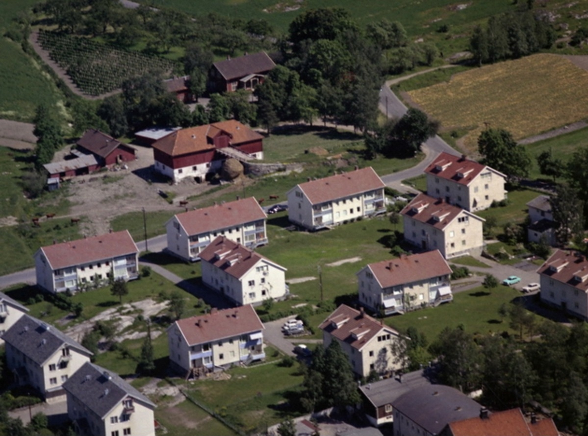 Nordseter gård oppe til venstre, 1962. Nyere bebyggelse til Nyquistveien i forgrunnen.